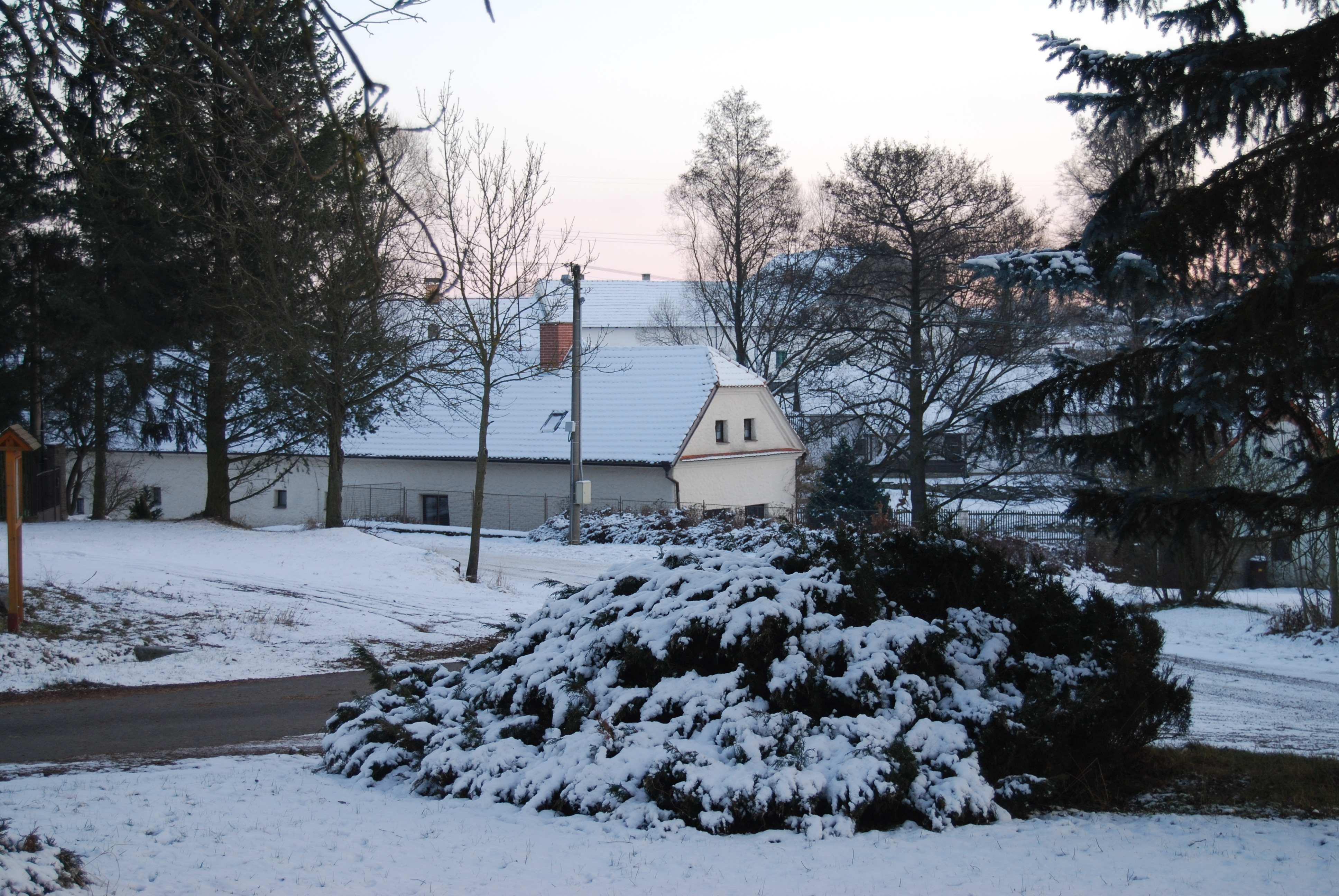 Pohled na část obce. Ohař je část města Mirovice v okrese Písek. Česká republika.